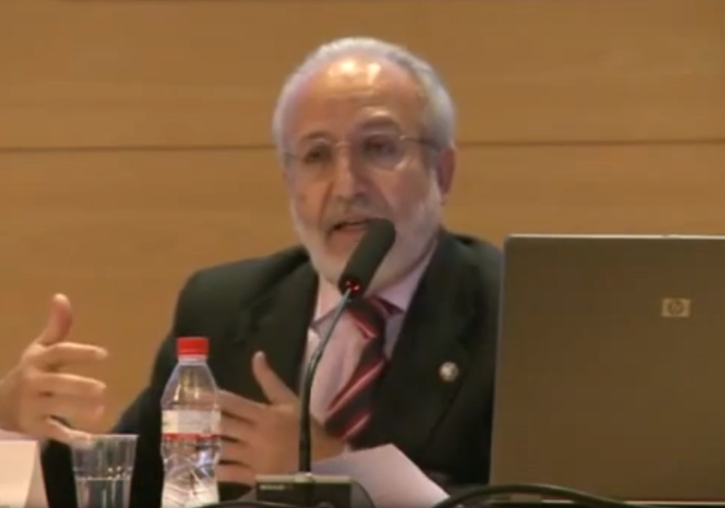 (II Congreso Int. de Pedagogía Amigoniana - 16 - Noviembre) Por D. Manuel Jesús Dolz Lago Fiscal del Tribunal Supremo